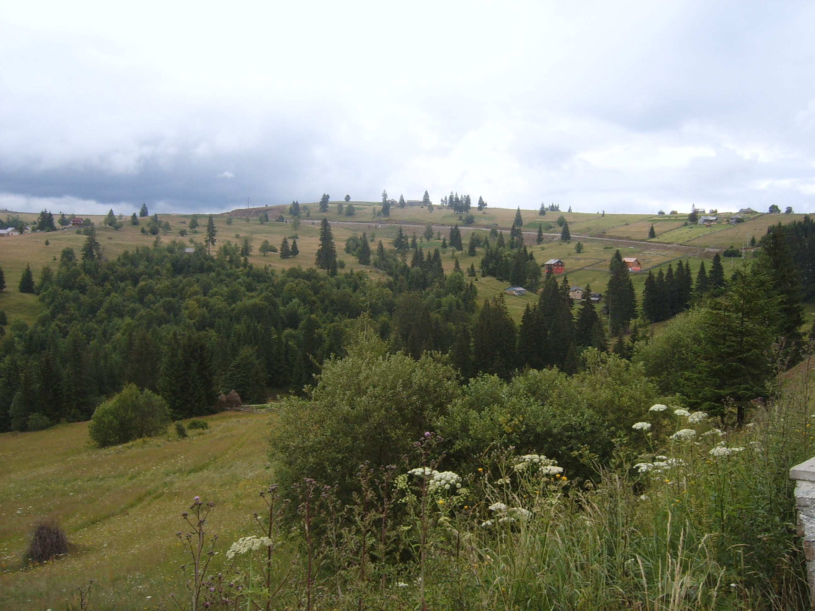 Col de Tihuţa, Roumanie